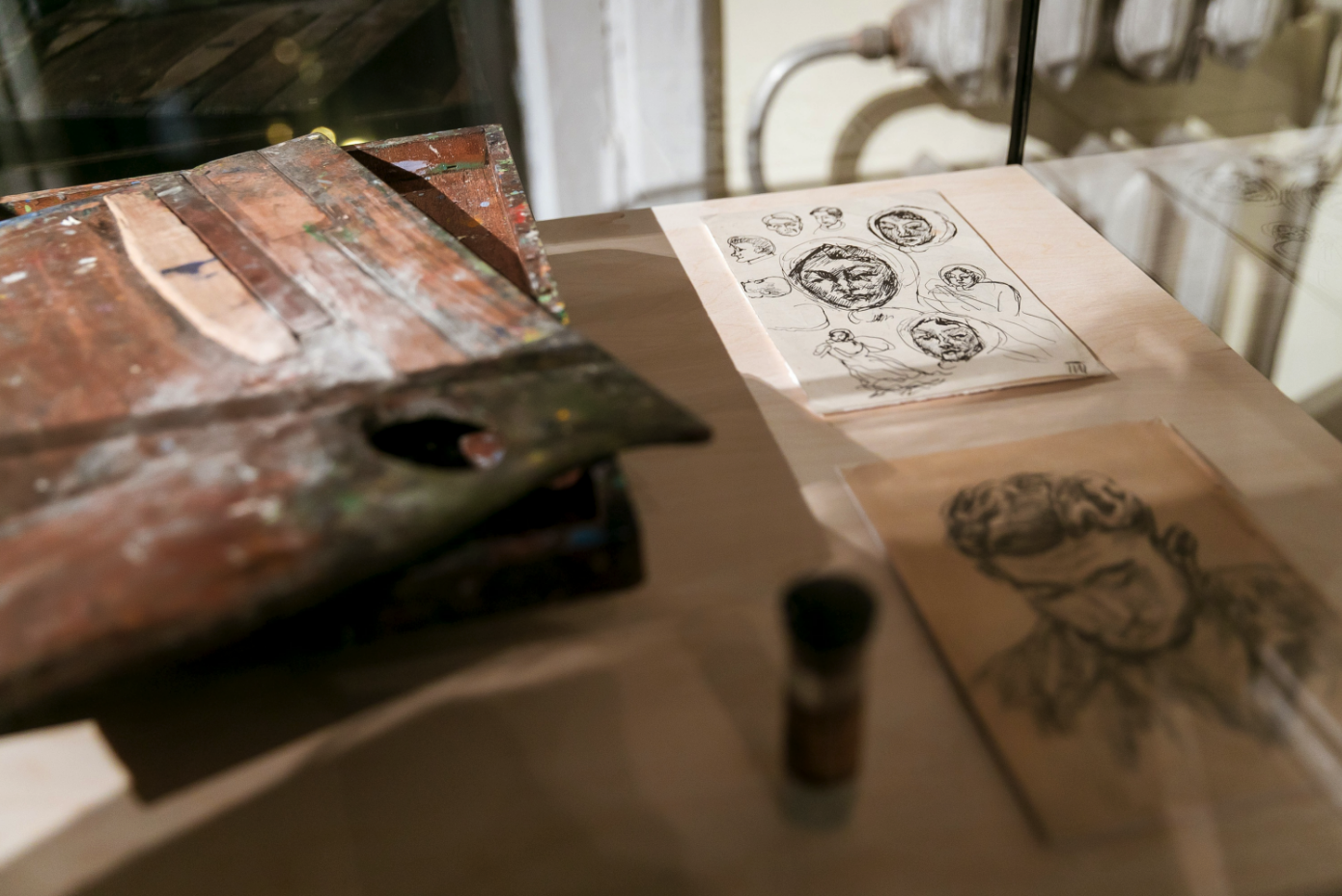 Витрина в мемориальном музее-мастерской Петра Кончаловского, 2017 год